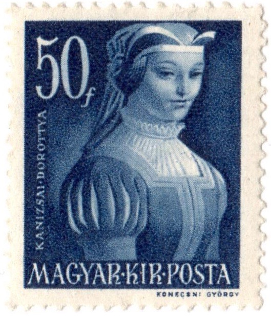 Briefmarke Ungarn, Ausgabe 1944 (Michel Nr. 757)